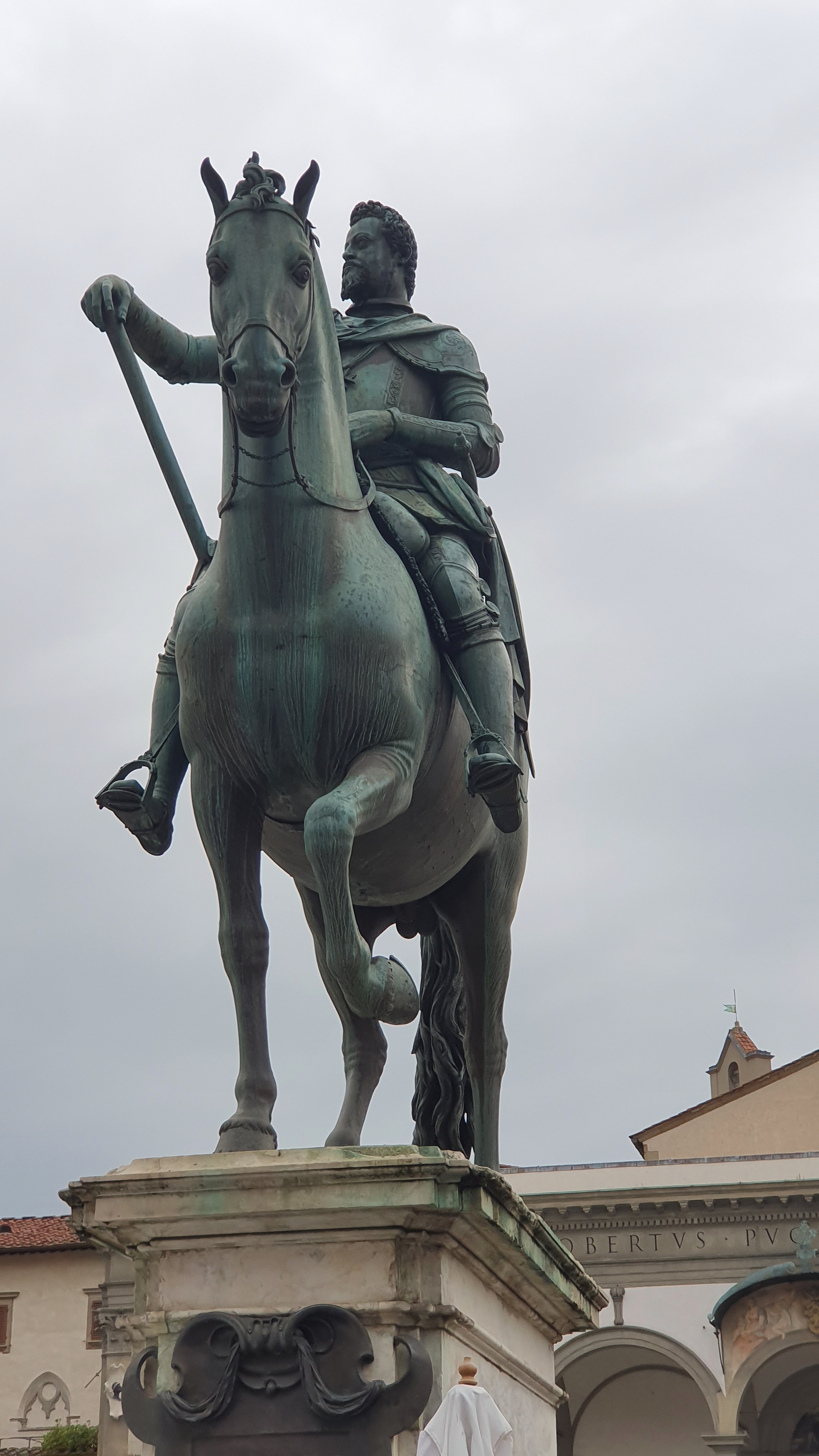 Statue to Ferdinando I de' Medici by Giambologna